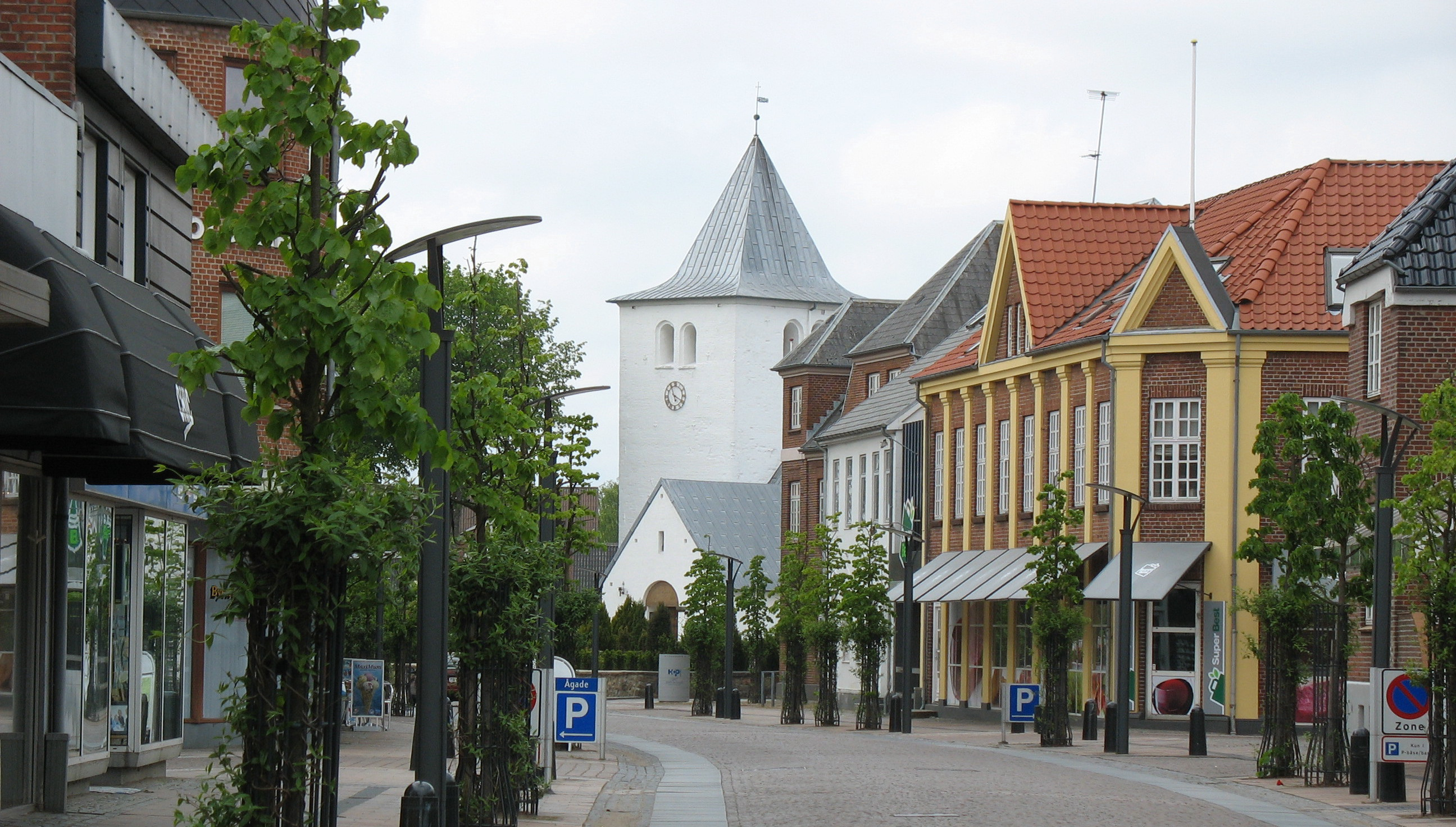 Storegade i Brande.